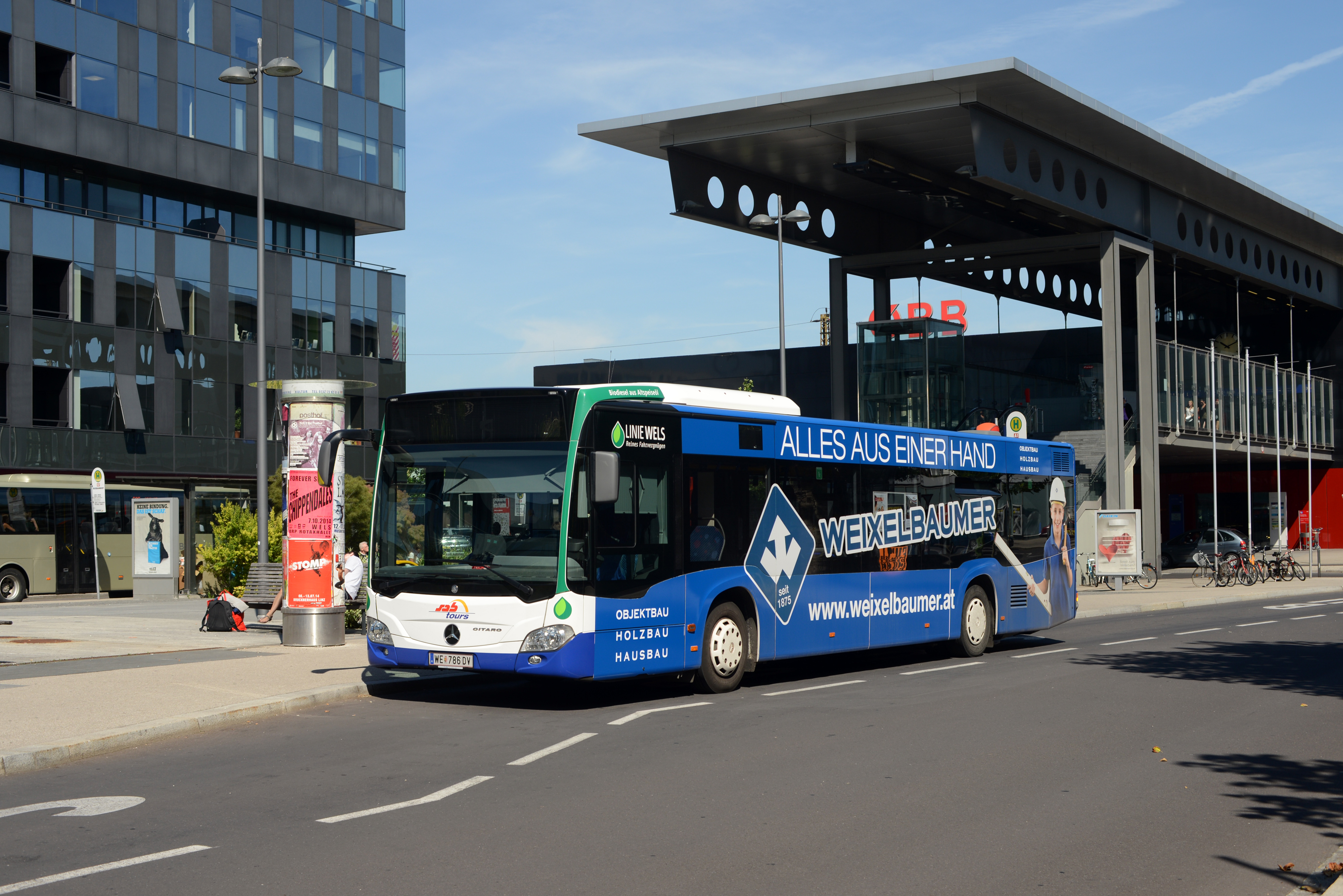 Mercedes Citaro 2 von Sabtours, WE 486 DV, beim Welser Hauptbahnhof